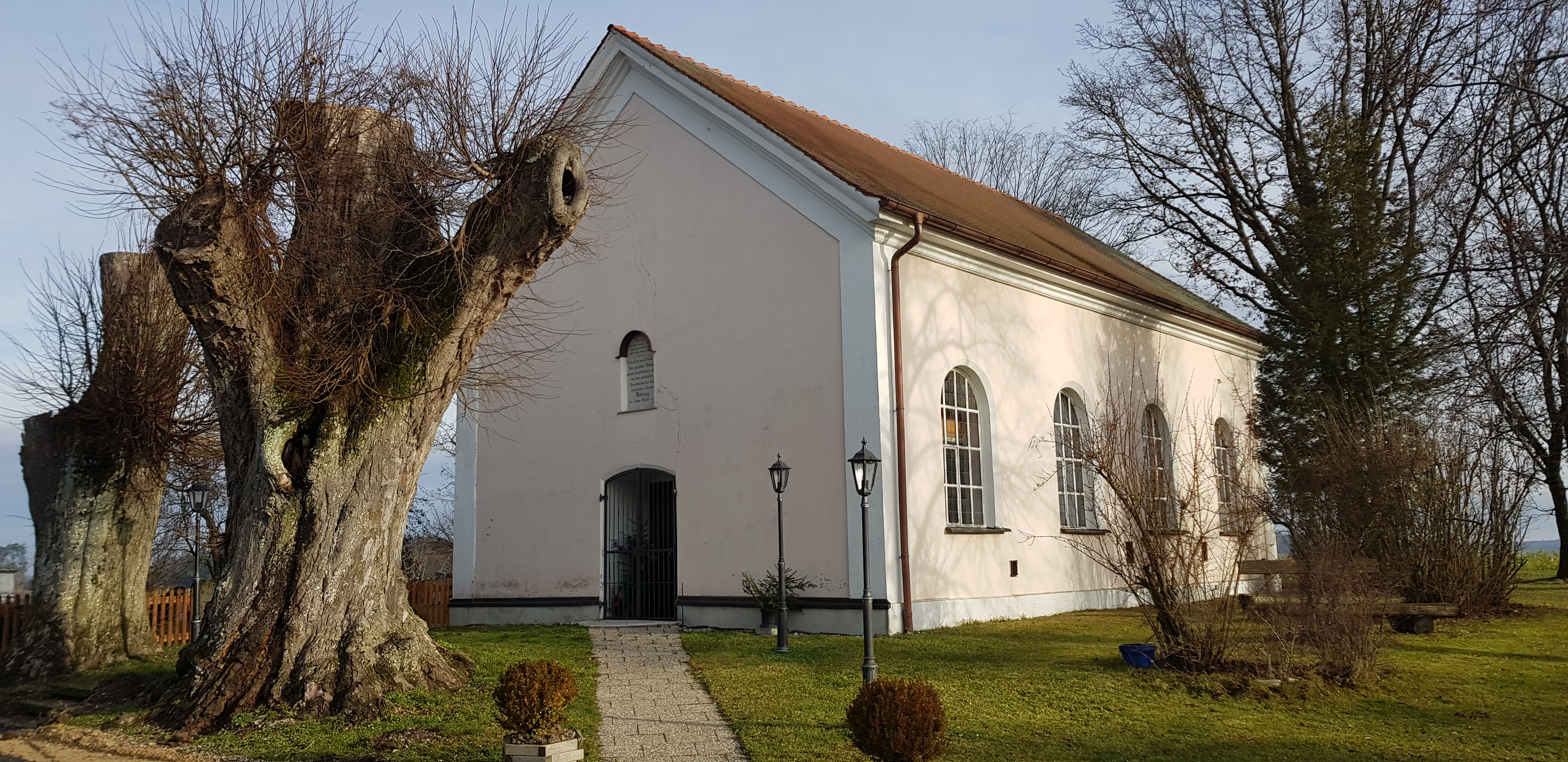 Mennonitisches Bethaus in Eichstock bei Markt Indersdorf, Bayern